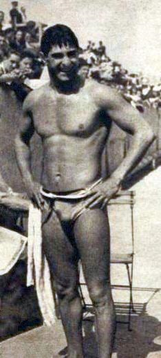 Afred 'Artem' Nakache, en septembre 1941 à Toulouse lors des championnats de France de natation (3 titres).